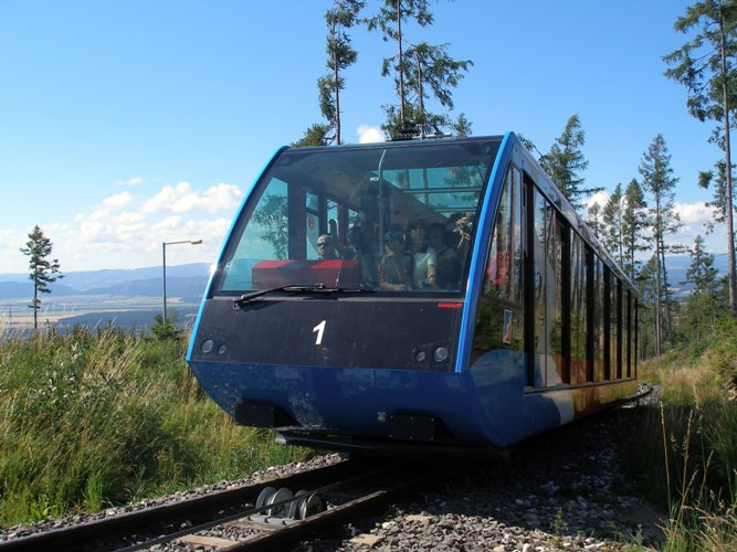 Osada Starý Smokovec, lanovka na Hrebienok